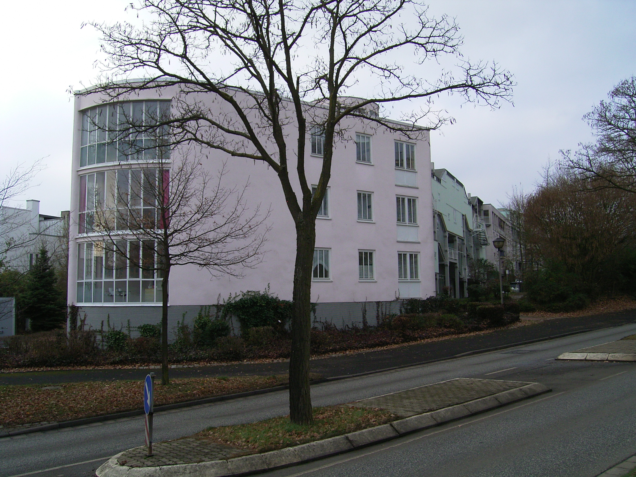 documenta urbana Wohngebäude in Kassel 1979-1982. Kopfbau der „Wohnschlange“ Hilmer und Sattler. Im Vordergrund die Heinrich-Schütz-Allee